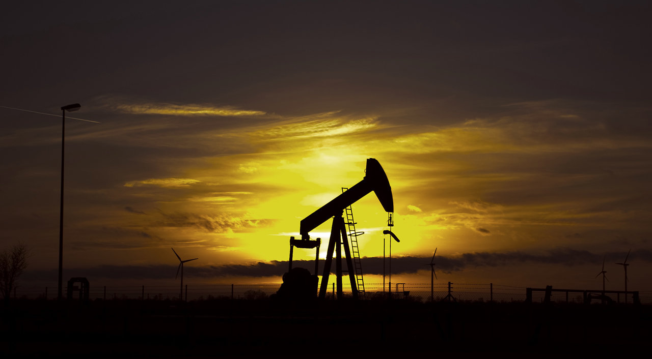 Jaknikker bij Zonsondergang